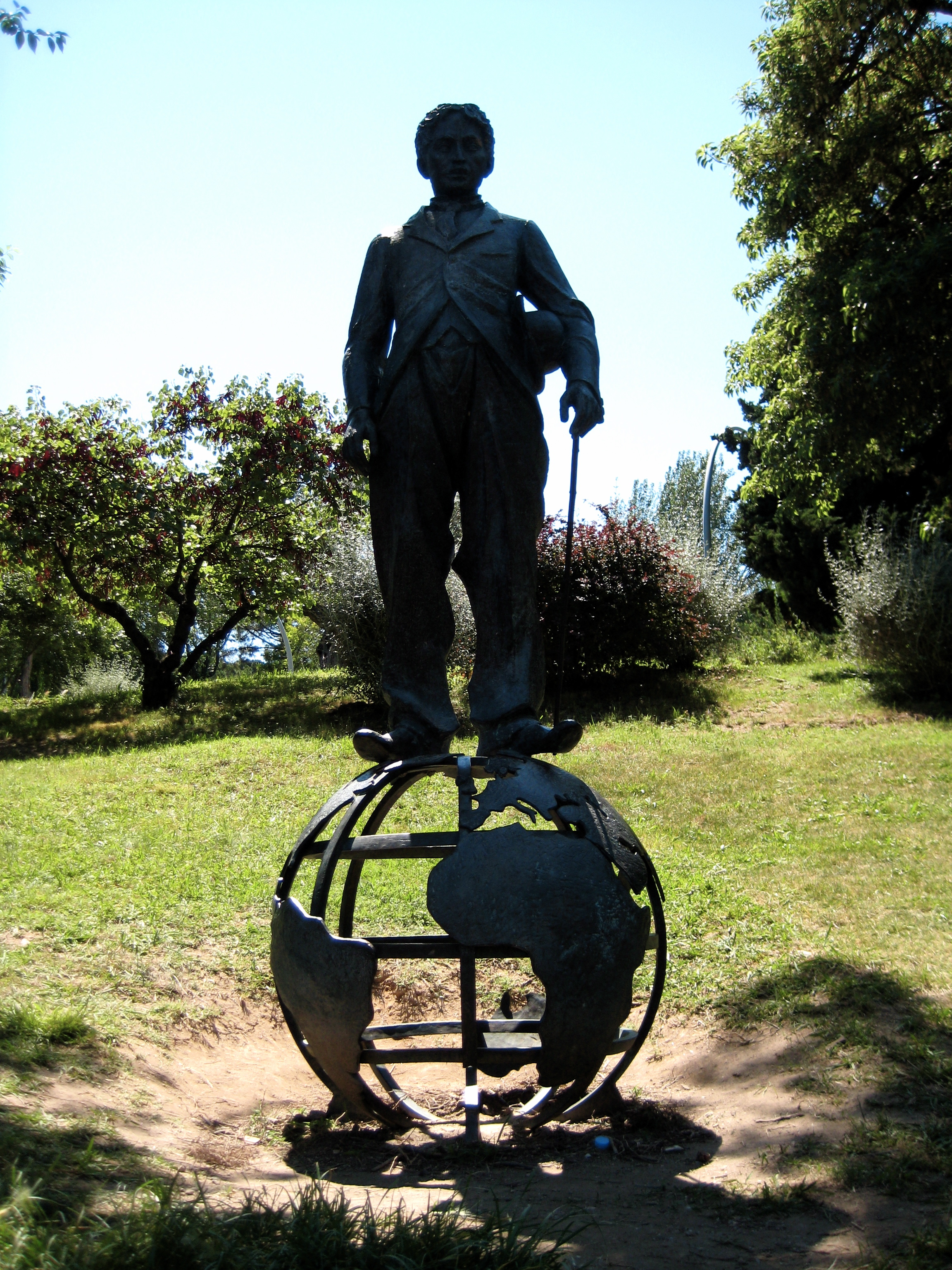 Escultura a Charlot (Charles Chaplin). Obra de l'escultora Núria Tortras Planas, de 1972, situada als Jardins de Joan Brossa, a Montjuïc.